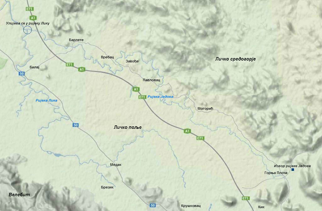 Мапа ријеке Јадове, Лика